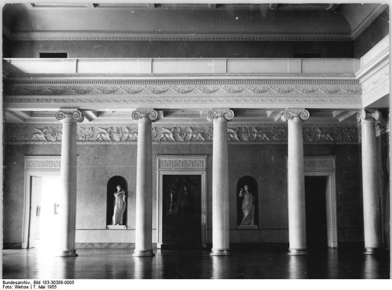 Weimar, Schloss, großer Festsaal Zentralbild TBD (Wehse) 7.5.1955 Zur Schiller-Ehrung 1955 Ein Blick in das Weimarer Schloß Der große Festsaal des Weimarer Stadtschlosses, auch "Weisser Saal " genannt, der von Heinrich Gentz nach Goethes Wünschen gebaut worden ist, umfaßt zwei Stockwerke und spricht durch seine harmonische Geschlossenheit besonders an. Die Gipsplastiken und reliefs hat Friedrich Tieck geschaffen. Der Saal wurde 1953 zur Lucas-Cranach-Ausstellung restauriert. Während der Zentralen Schiller-Ehrung in Weimar werden in diesem Saal, der am 9.5. durch eine festliche Stadtverordnetensizung eröffnet wird, verschiedene Schillervorträge von nahmhaften deutschen und ausländischen Wissenschaftlern gehalten. UBz: Blick in den grossen Festsaales.